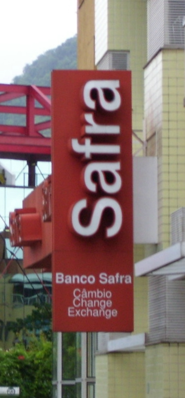 Logotipo do Banco Safra em agência do Rio de Janeiro, RJ, Brasil.